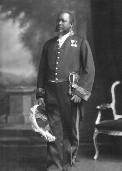 Portrait du diplomate Louis-Jospeh Janvier